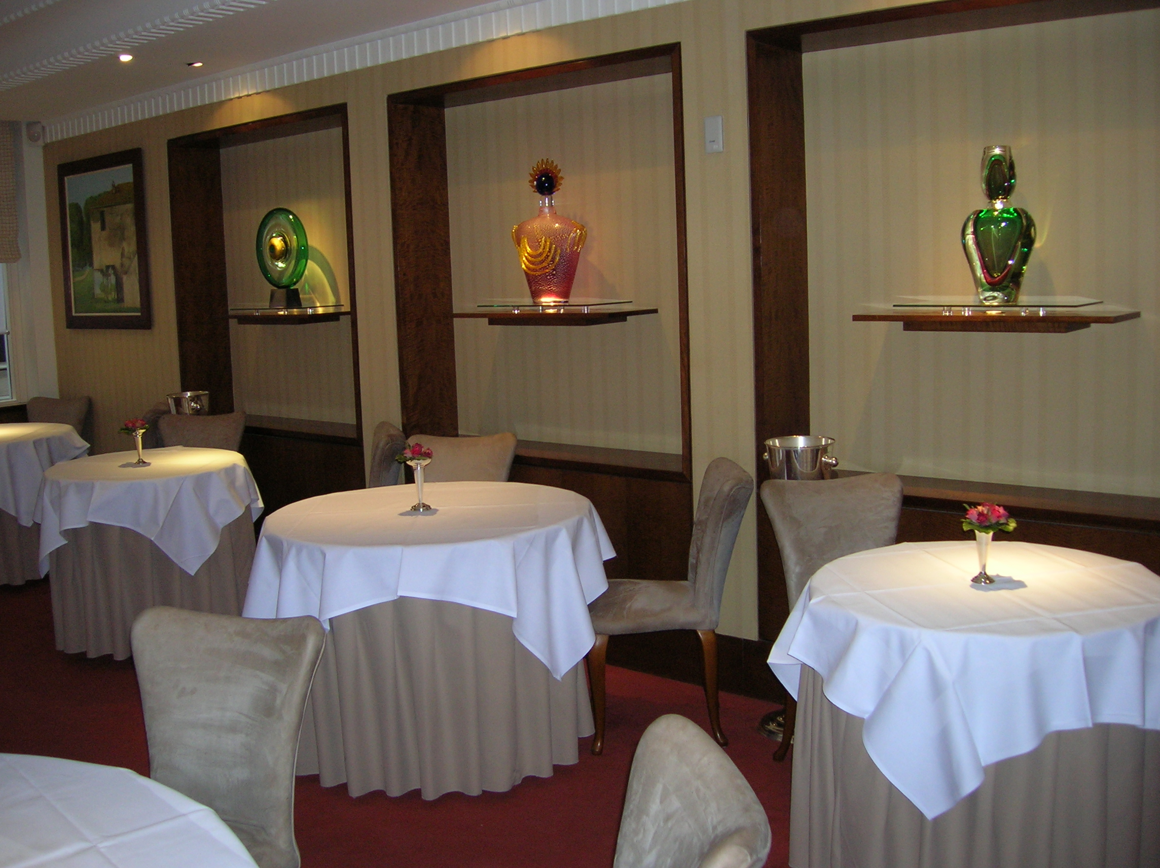 חדר האוכל במסעדת גורדון רמזי